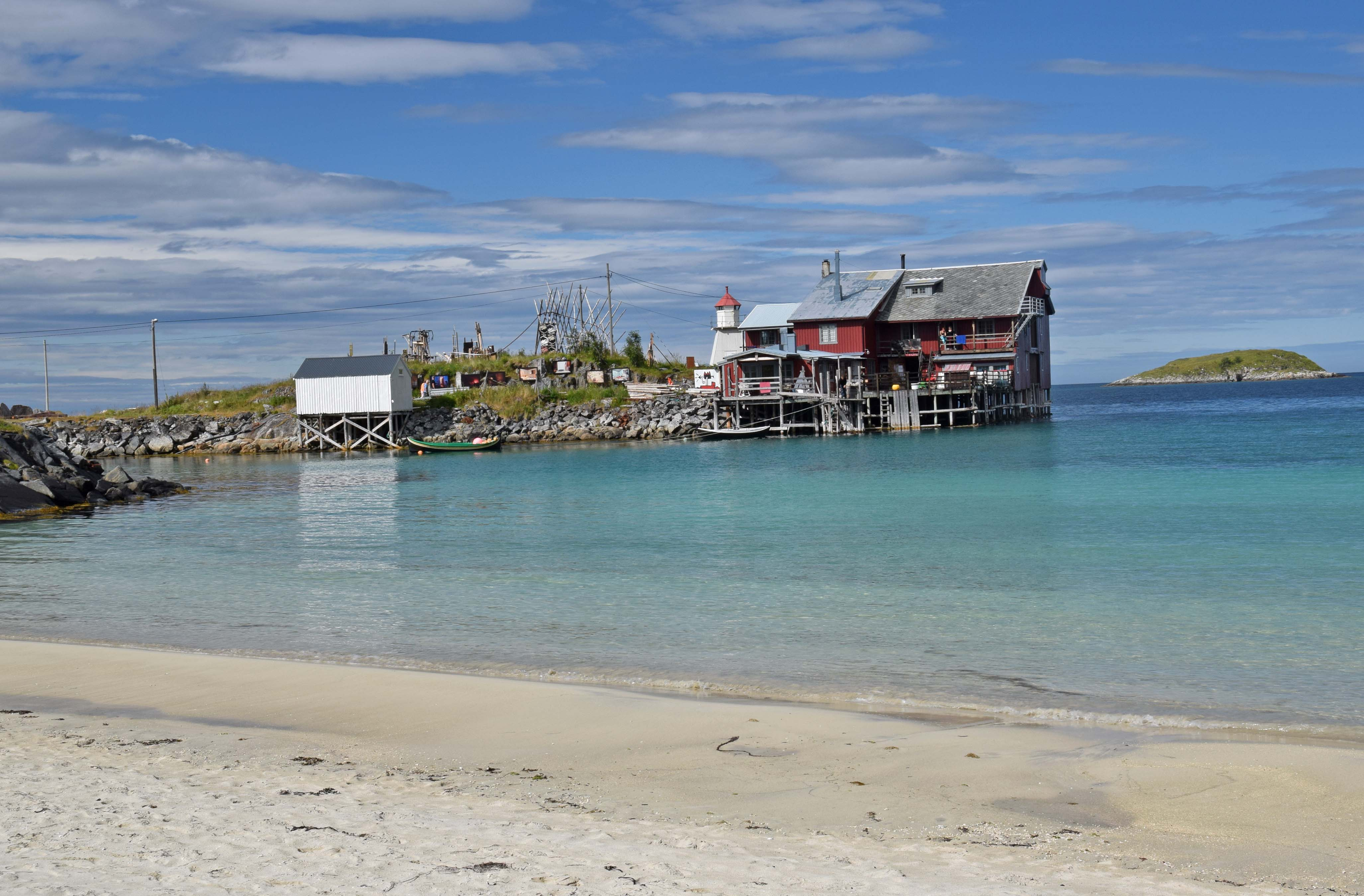 Kråkeslottet, etablert 1973 som sted der kunstnere kan bo i en periode, Kråkeslottfestivalen, kunstutstillinger, kafé m.m., Bøvær, Senja